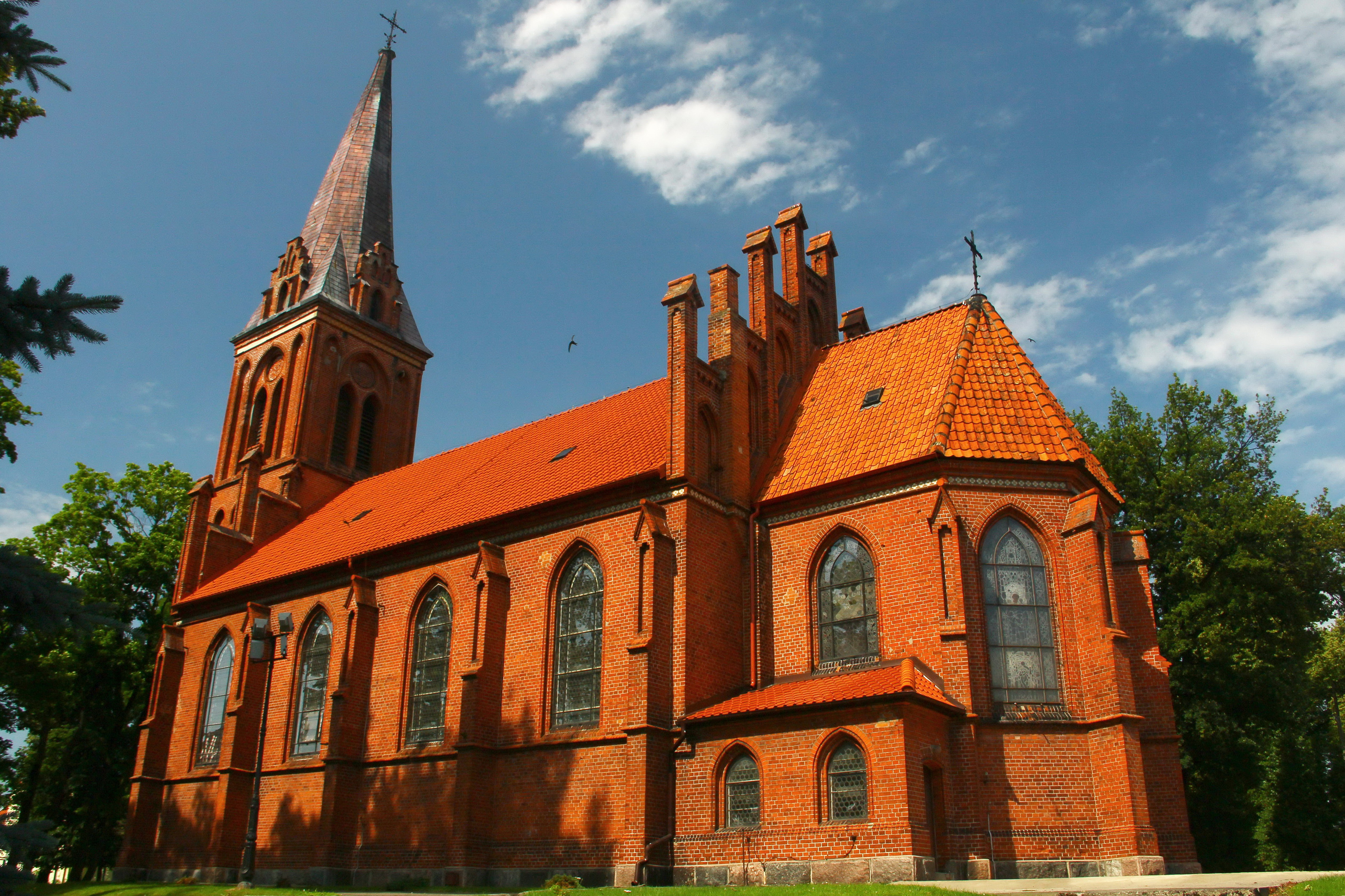 Diecezjalne sanktuarium św. Brunona Bonifacego z Kwerfurtu w Bartoszycach (zabytek nr A-4470 z 3.07.2007).